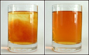 Zur Entropie einer Mischung zweier Flüssigkeiten. Rechts ist die Entropie höher.